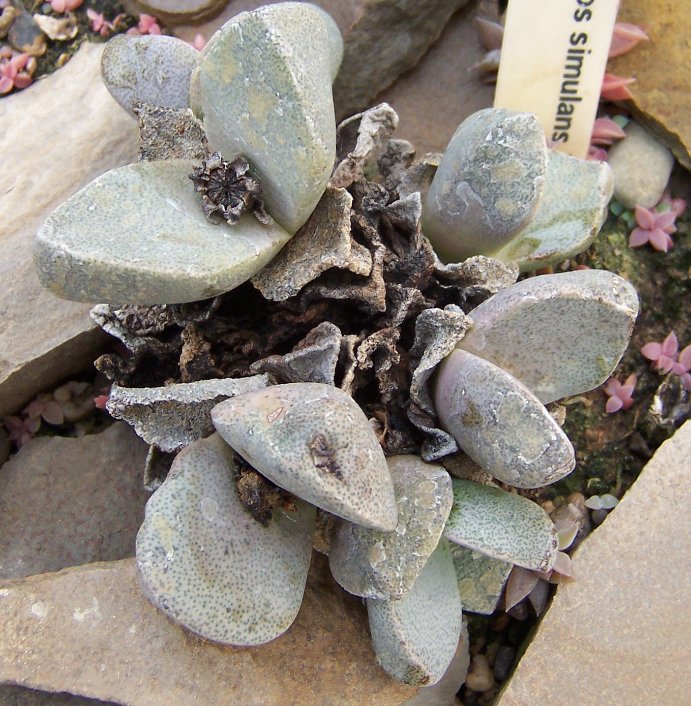 Pleiospilos simulans, habitus